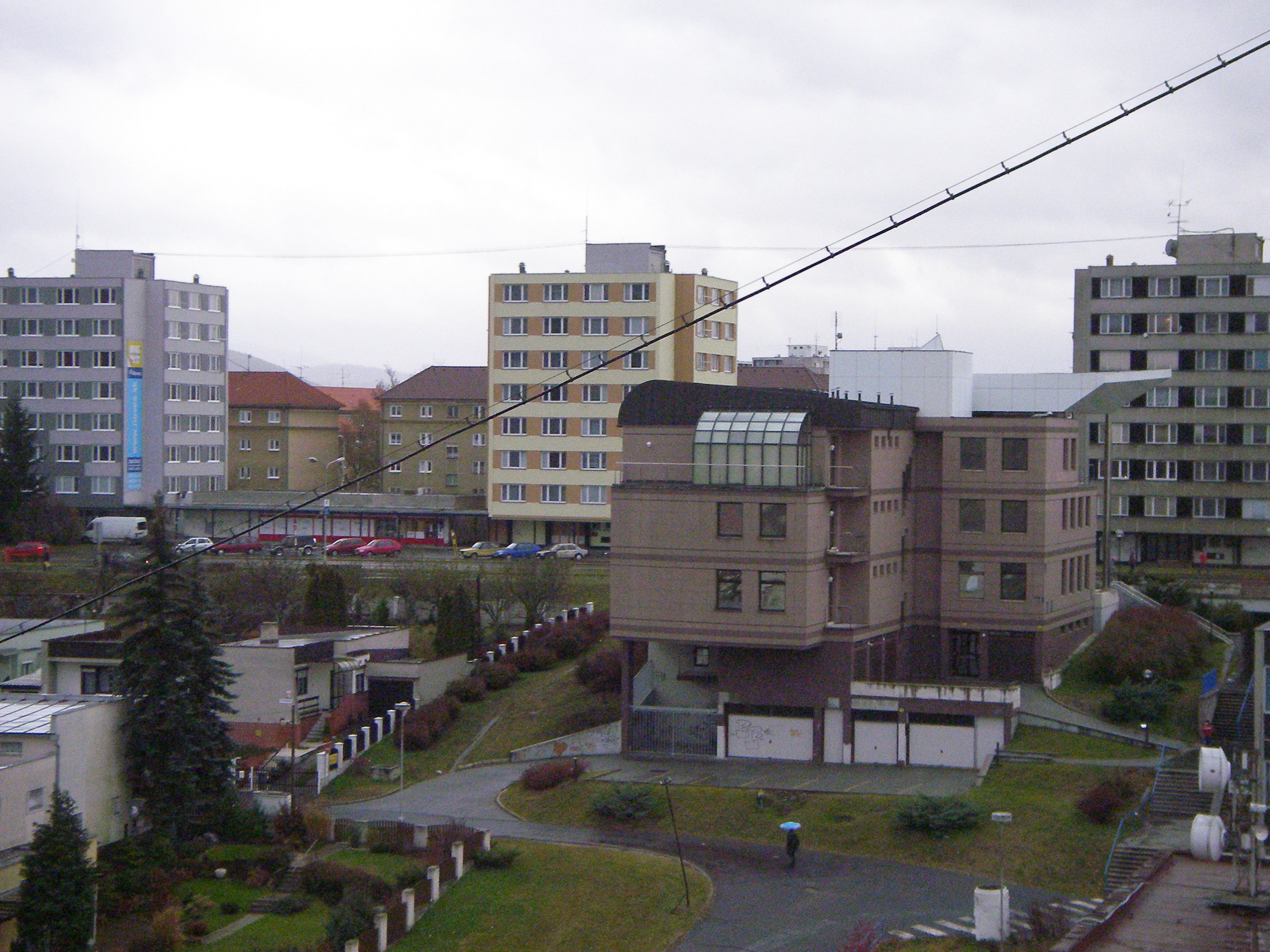 SNP 1249/132, Žiar nad Hronom